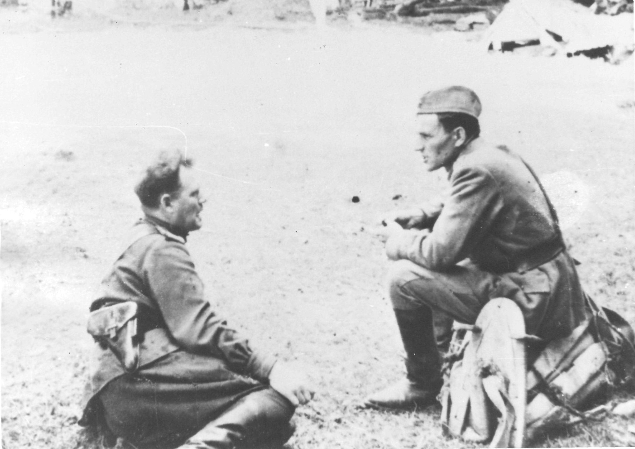 Srpskohrvatski / српскохрватски: Sovjetski kino reporter, potpukovnik Vladimir Ješukin, i partizanski komandant Peko Dapčević na Kopaoniku 13. avgusta 1944.